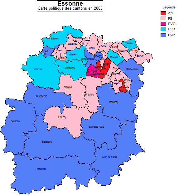 Carte politique des cantons de l'Essonne en 2008.